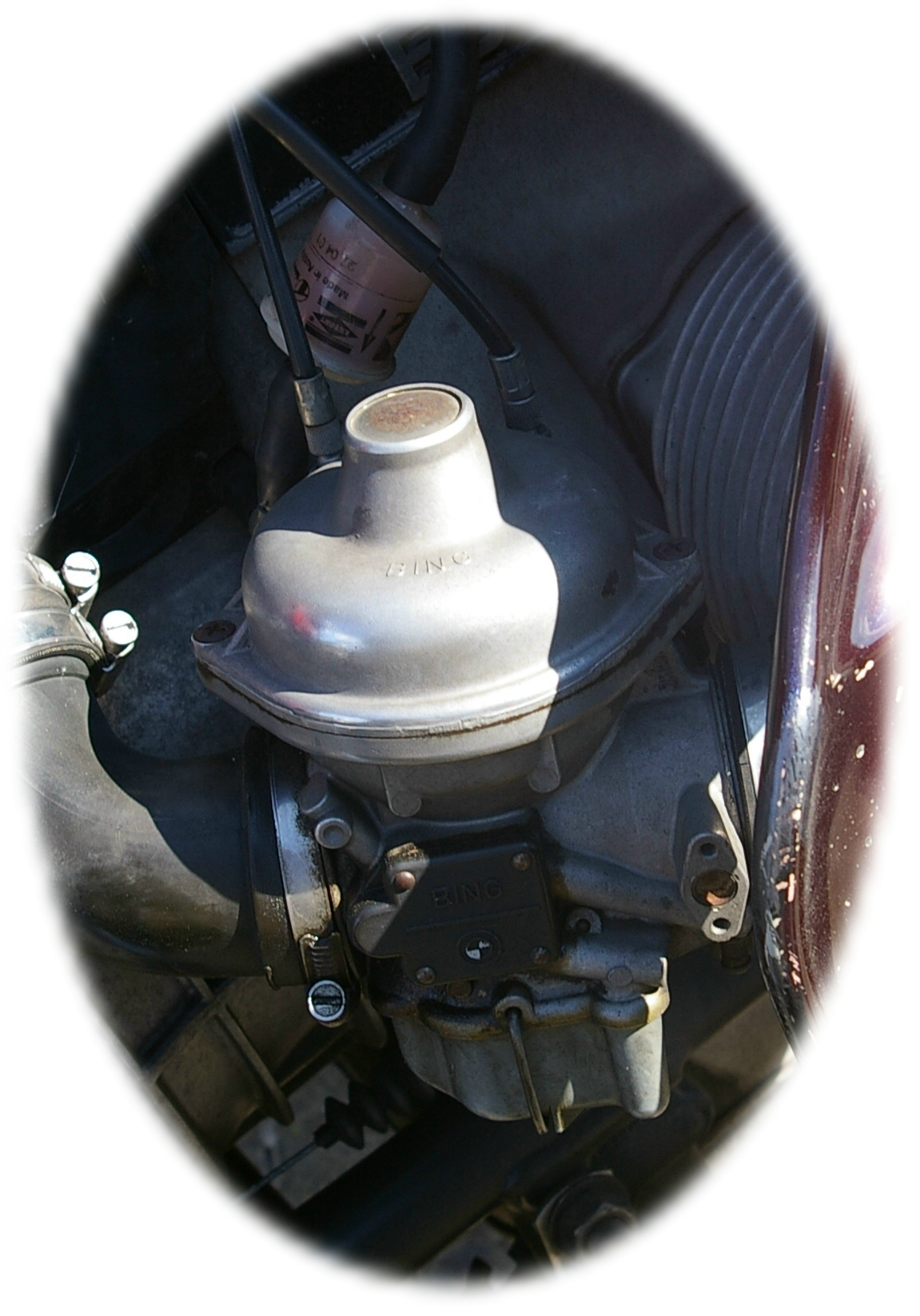 Gleichdruck-Vergaser Bing an BMW R 100 RS, DO-Hohensyburg